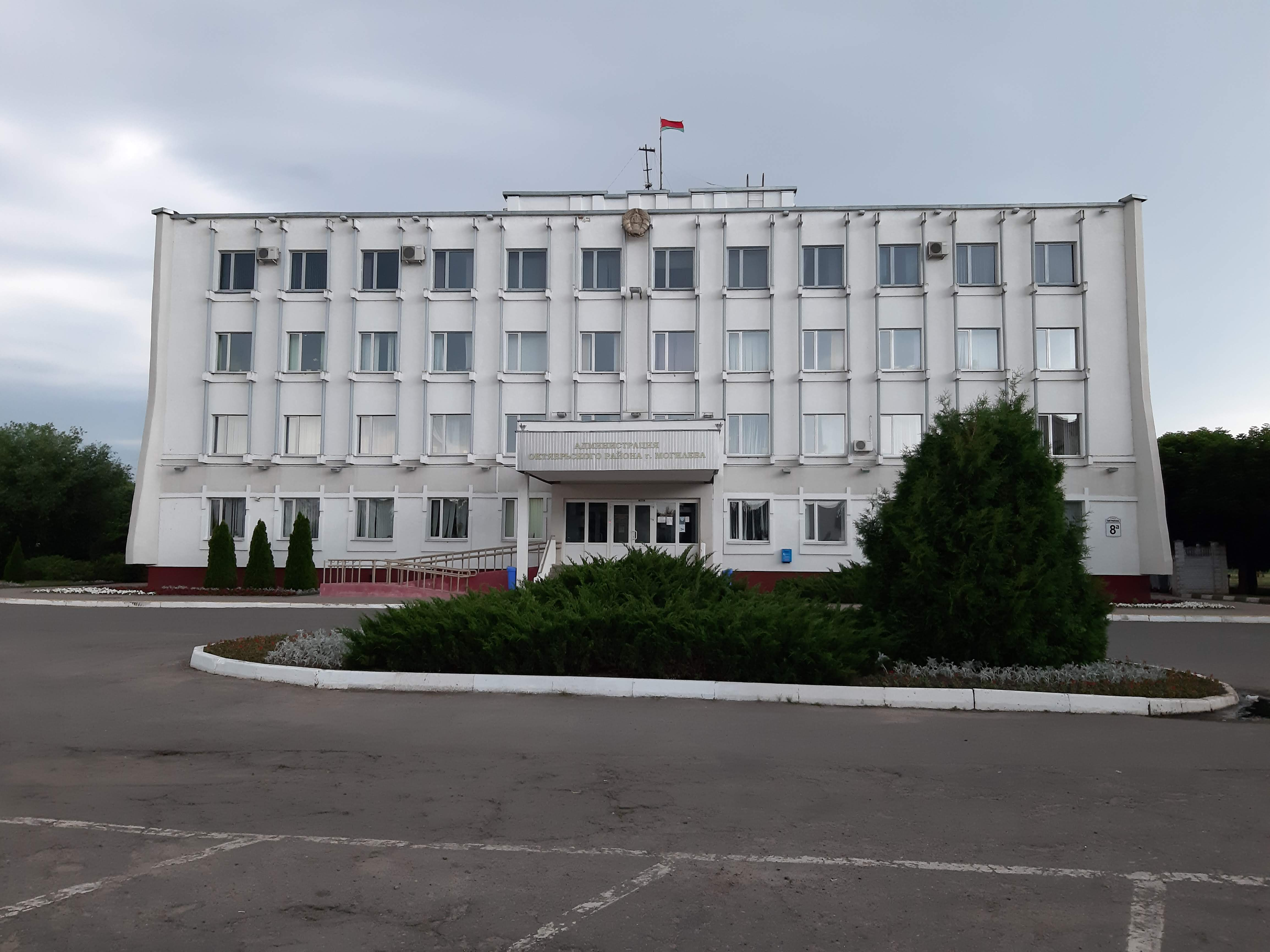 Магілёў. Па Чыгрынава